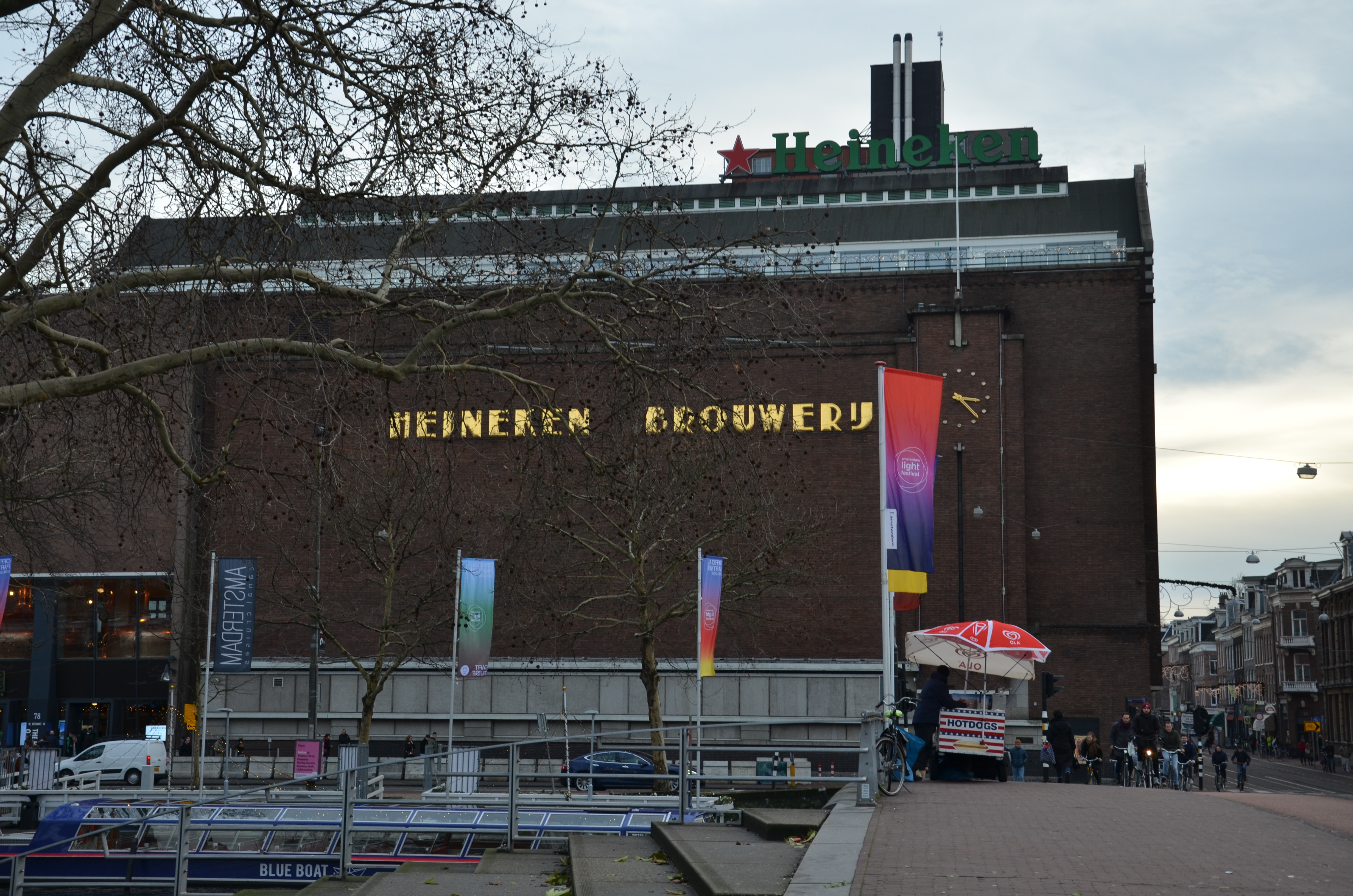 De Heineken Experience in Amsterdam.